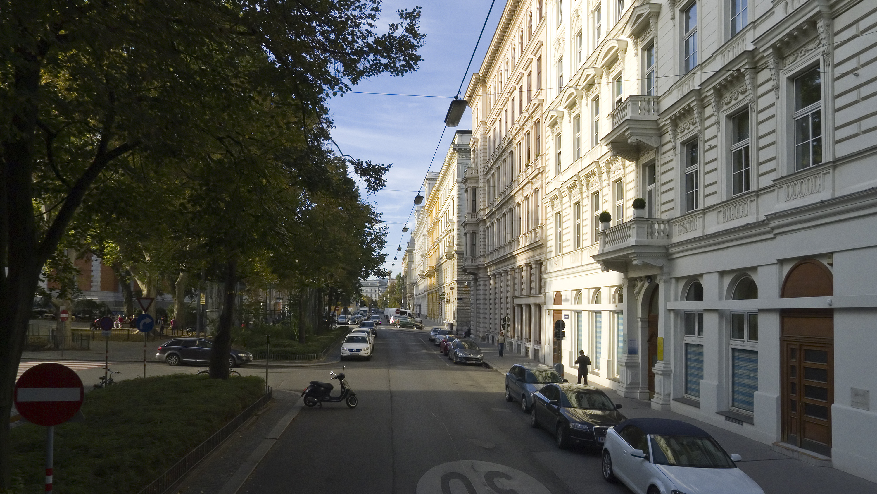 Börsegasse in Wien 1 bei Nr. 10 Richtung Nordwesten